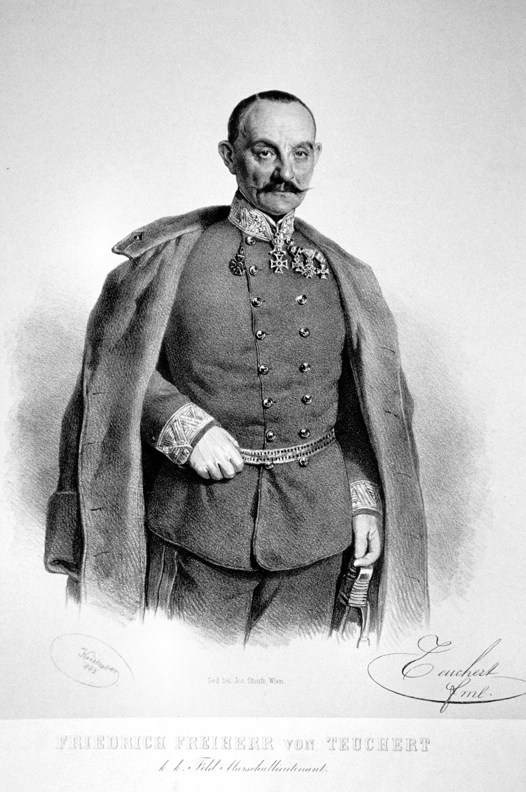 Friedrich Freuherr von Teuchert (1798-1872) k. k. Feldzeugmeister. Lithographie von Josef Kriehuber, 1862